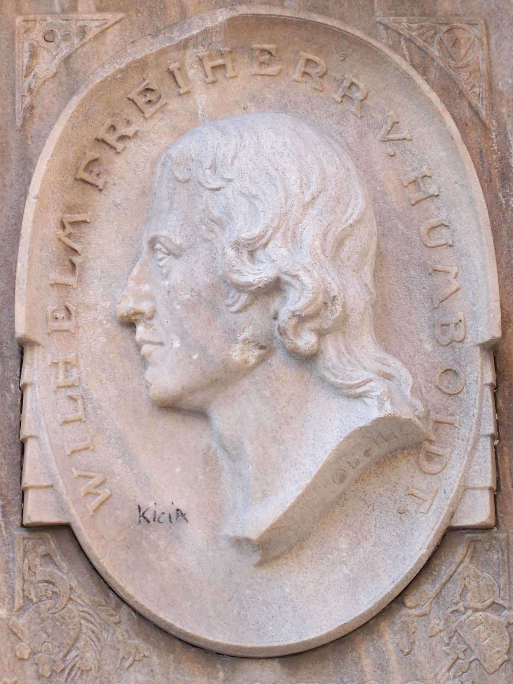 Wilhelm baron von Humboldt.